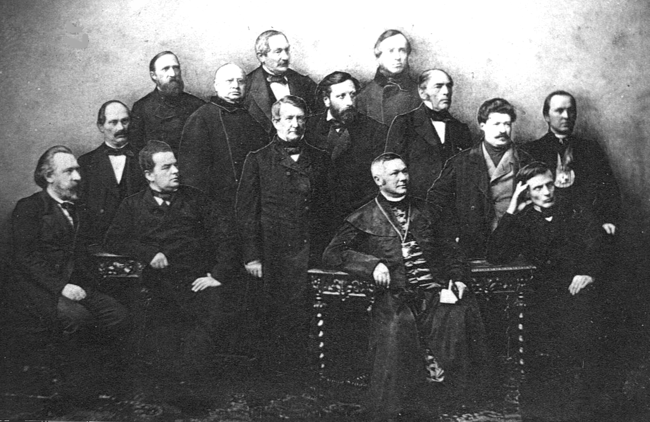 Delagacja Miejska in 1861